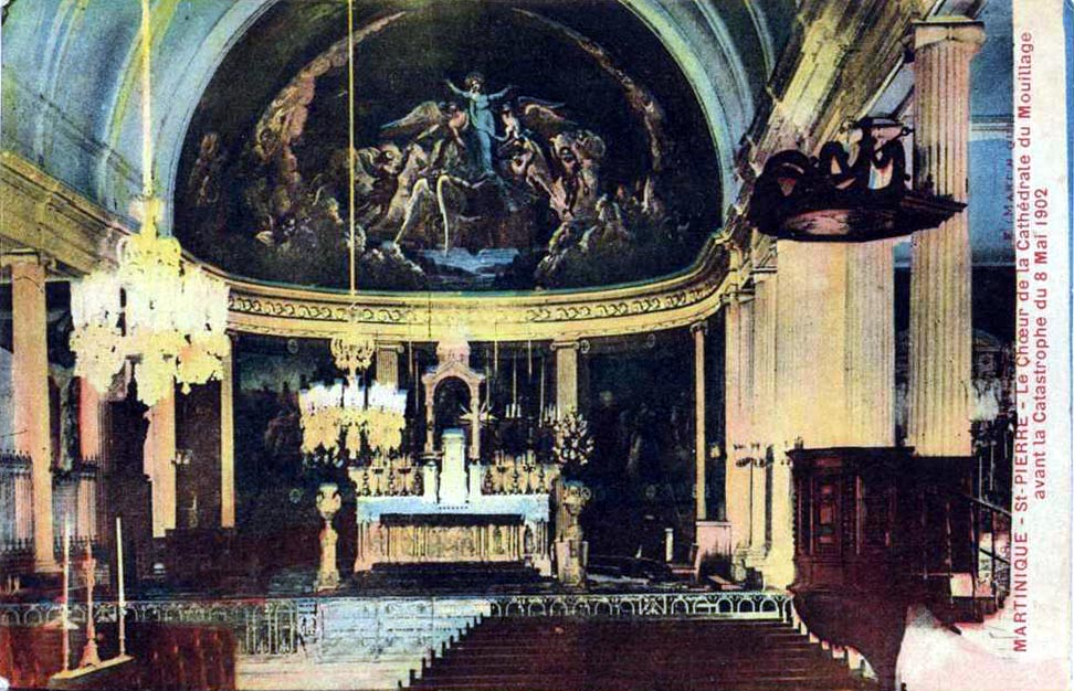 Intérieur de la cathédrale Notre-Dame-du-Bon-Port de Saint-Pierre de la Martinique. Photographie originale colorisée.